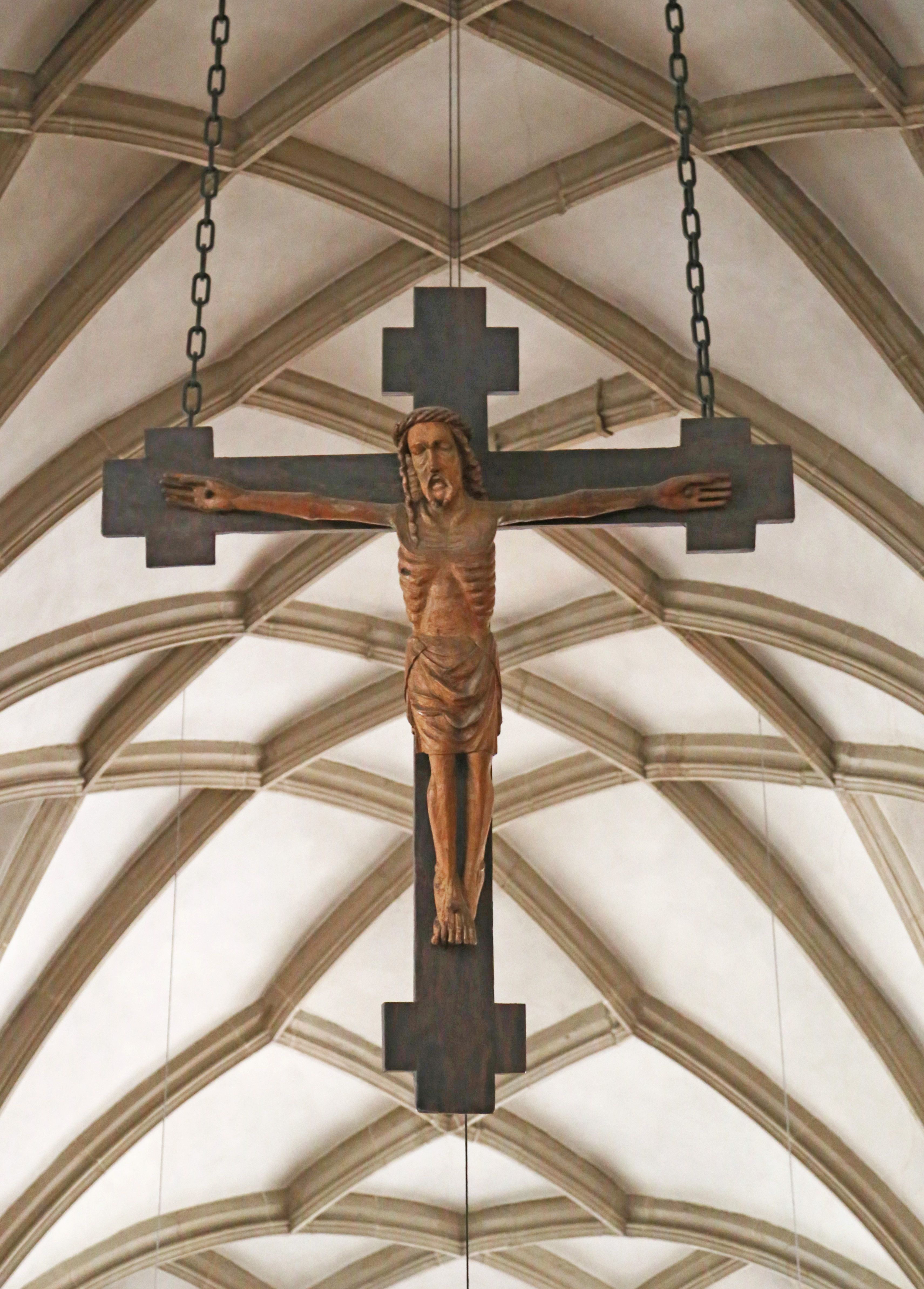 Pfarrkirche Sankt Pauli Bekehrung in St. Pauls, Gemeinde Eppan